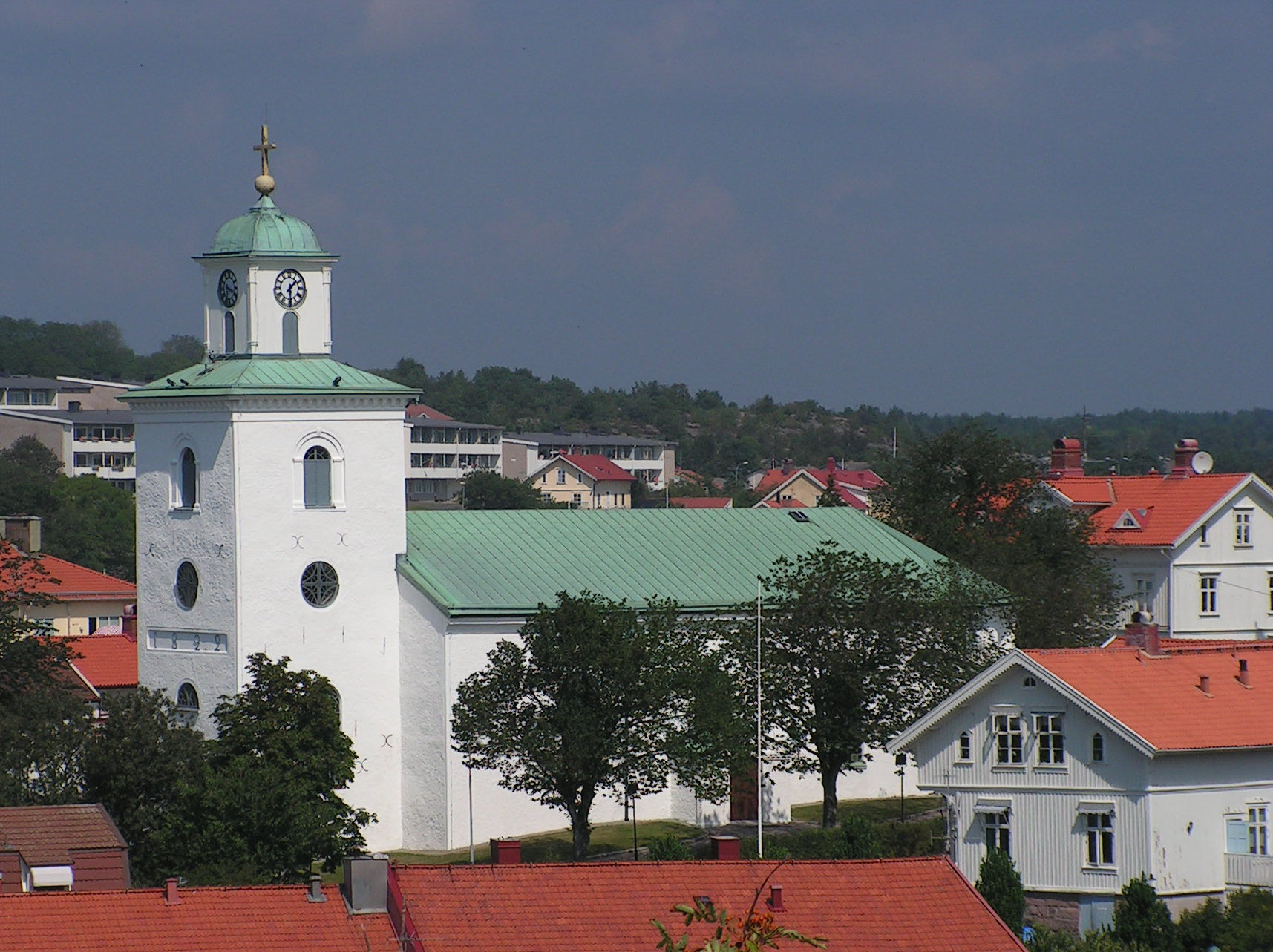 The church in Strömstad, Sweden